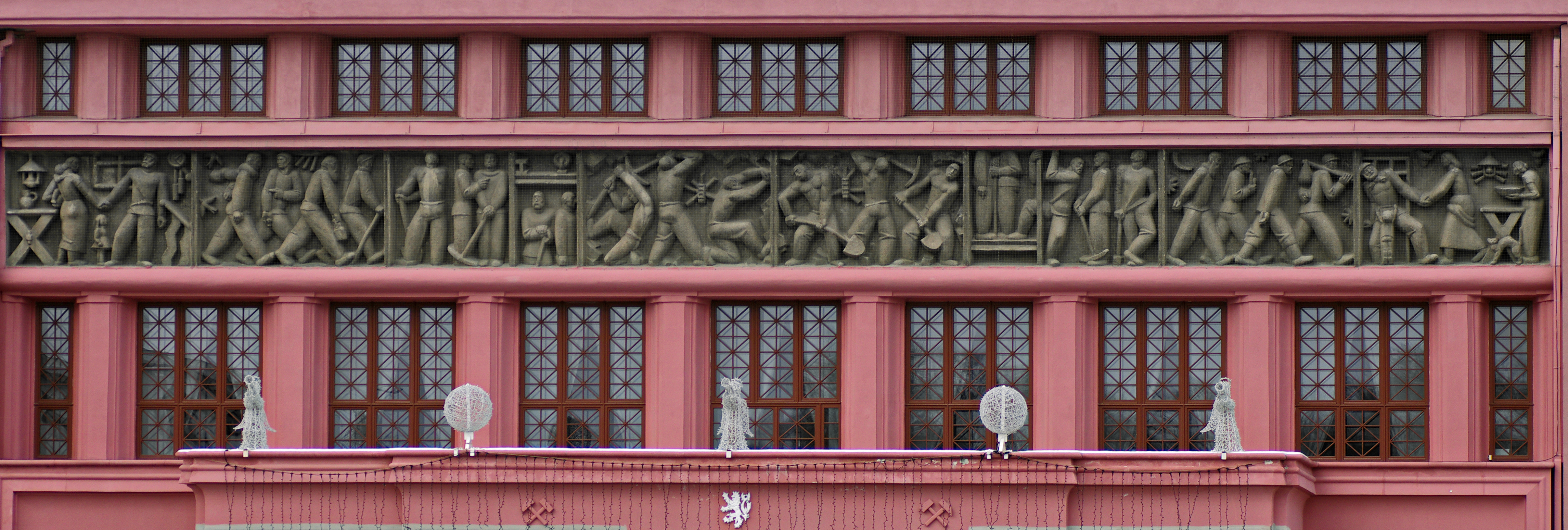 Hornický dům, náměstí Budovatelů, ul. 5. května 655, Sokolov.